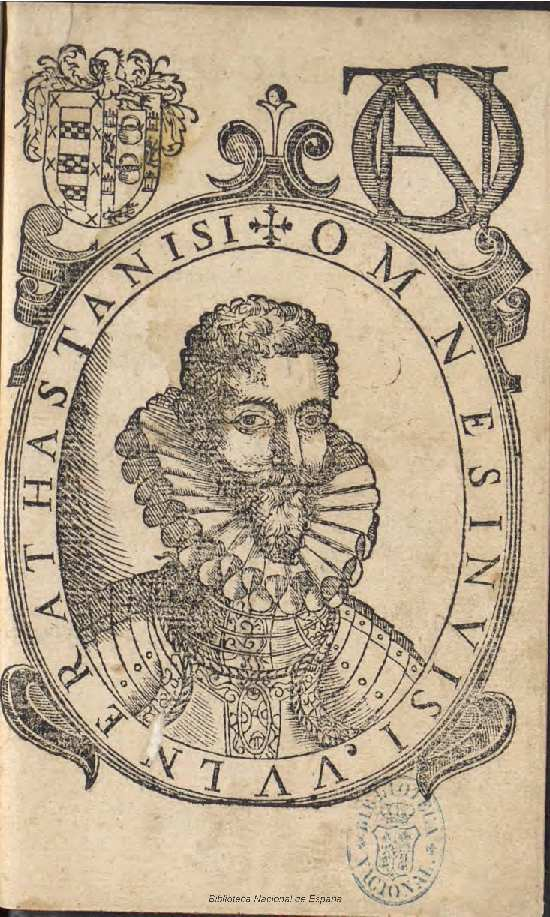 Antonio de Saavedra Guzmán, ilustración de El peregrino indiano, en Madrid, en casa de Pedro Madrigal, 1599. Grabado xilográfico con el retrato del autor a toda plana. Biblioteca Nacional de España